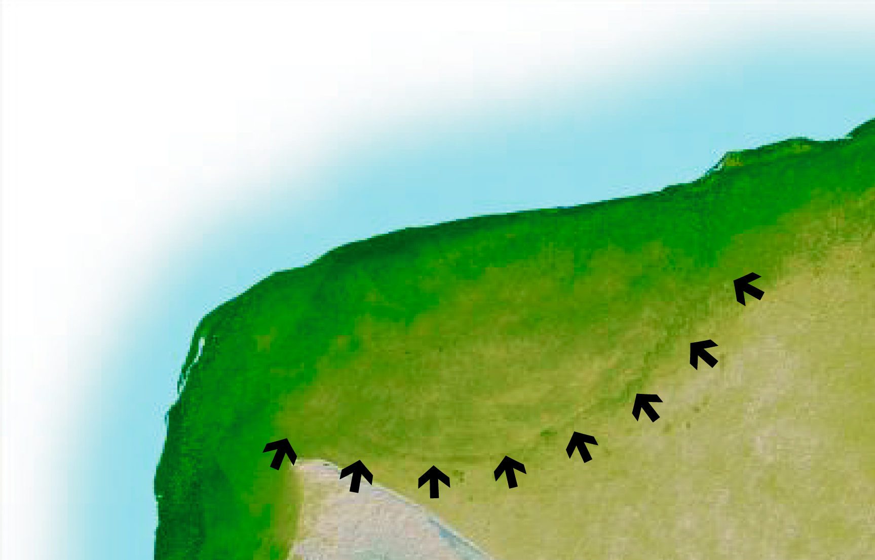 Cratère de Chicxulub, péninsule du Yucatan basé sur une carte de la NASA